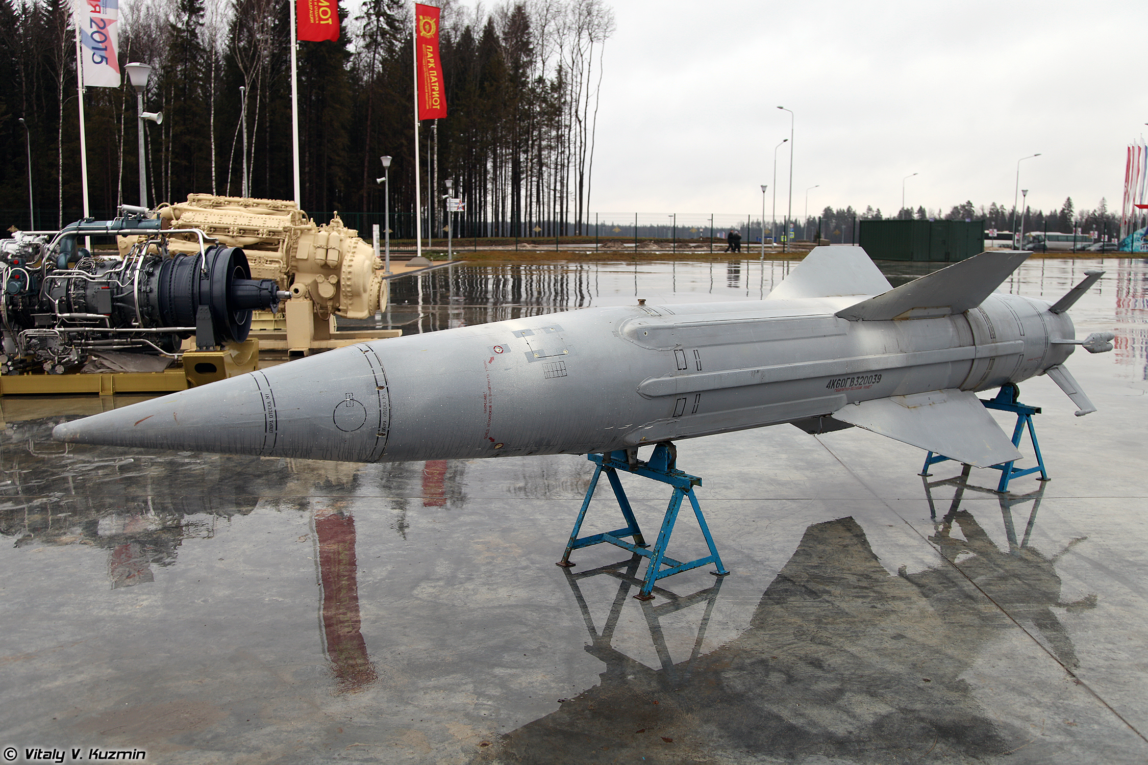 Зенитная управляемая ракета 4К60